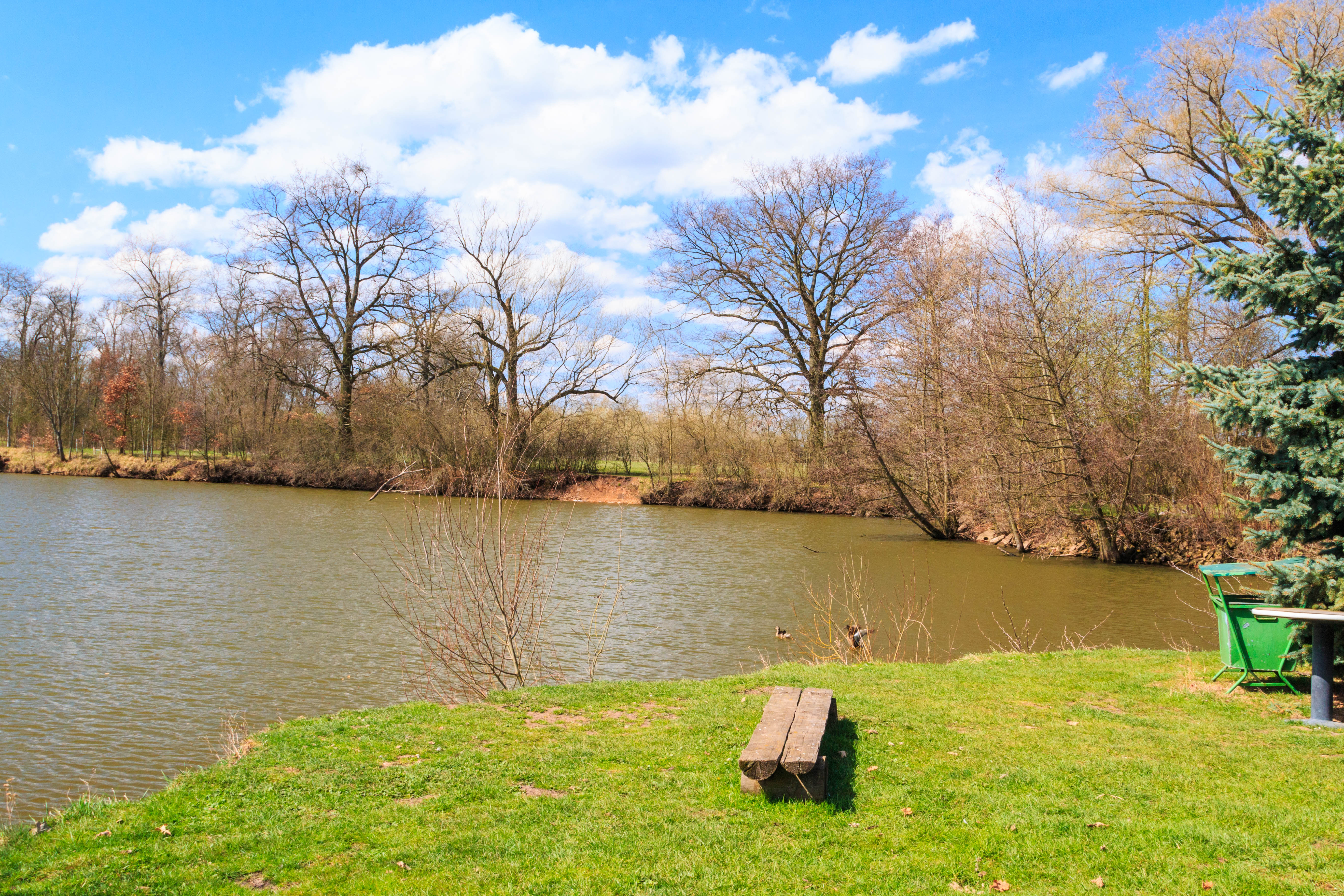 Rybník Myslivec u Skřivan Project: Vodstvo.